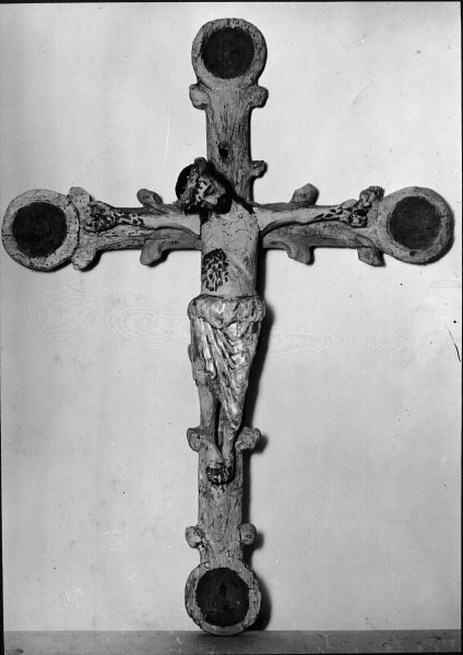 Triumfkrucifix från 1200-talets mitt, efter konservering. Kategori: (05) KrucifixTriumfkrucifix från 1200-talets mitt, efter konservering.